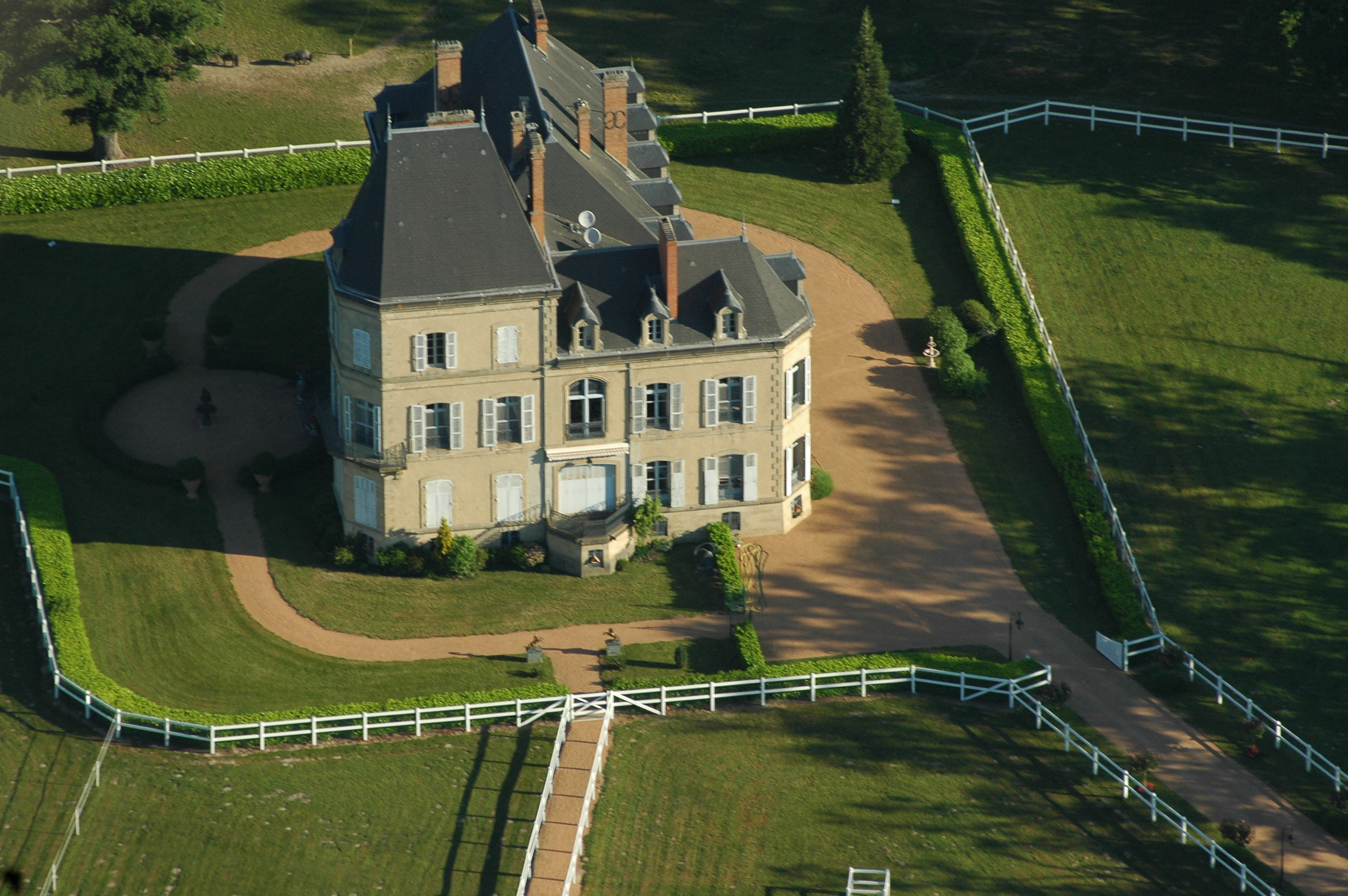 Le château des Bédaures à Trévol, Allier, France.